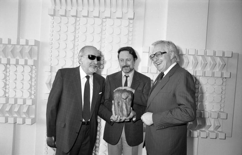 26.5.1988 Bundesrat - Präsident Dr. Bernhard Vogel überreicht den Hörspielpreis der Kriegsblinden 1988 an Ror Wolf - im Plenarsaal des Bundesrates